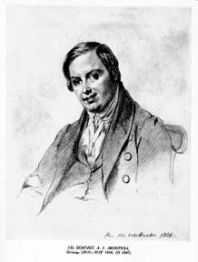 Портрет Андрія Івановича Лизогуба. Папір, олівець (21,3 × 17). [м. Седнев]. [28.II — 30.IV 1846; III 1847]. ДМШ, інв. № г — 911